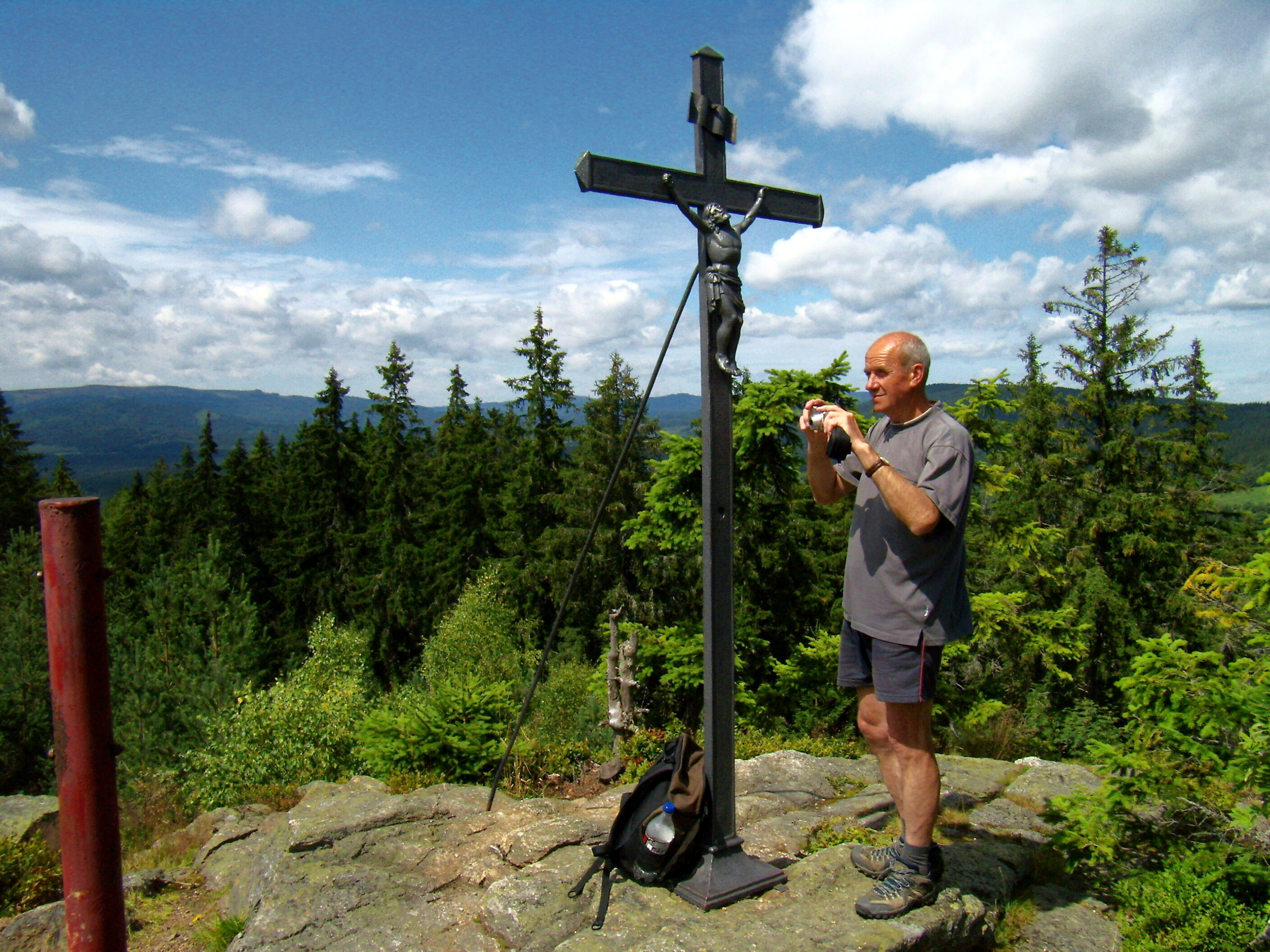 Březník - vrchol